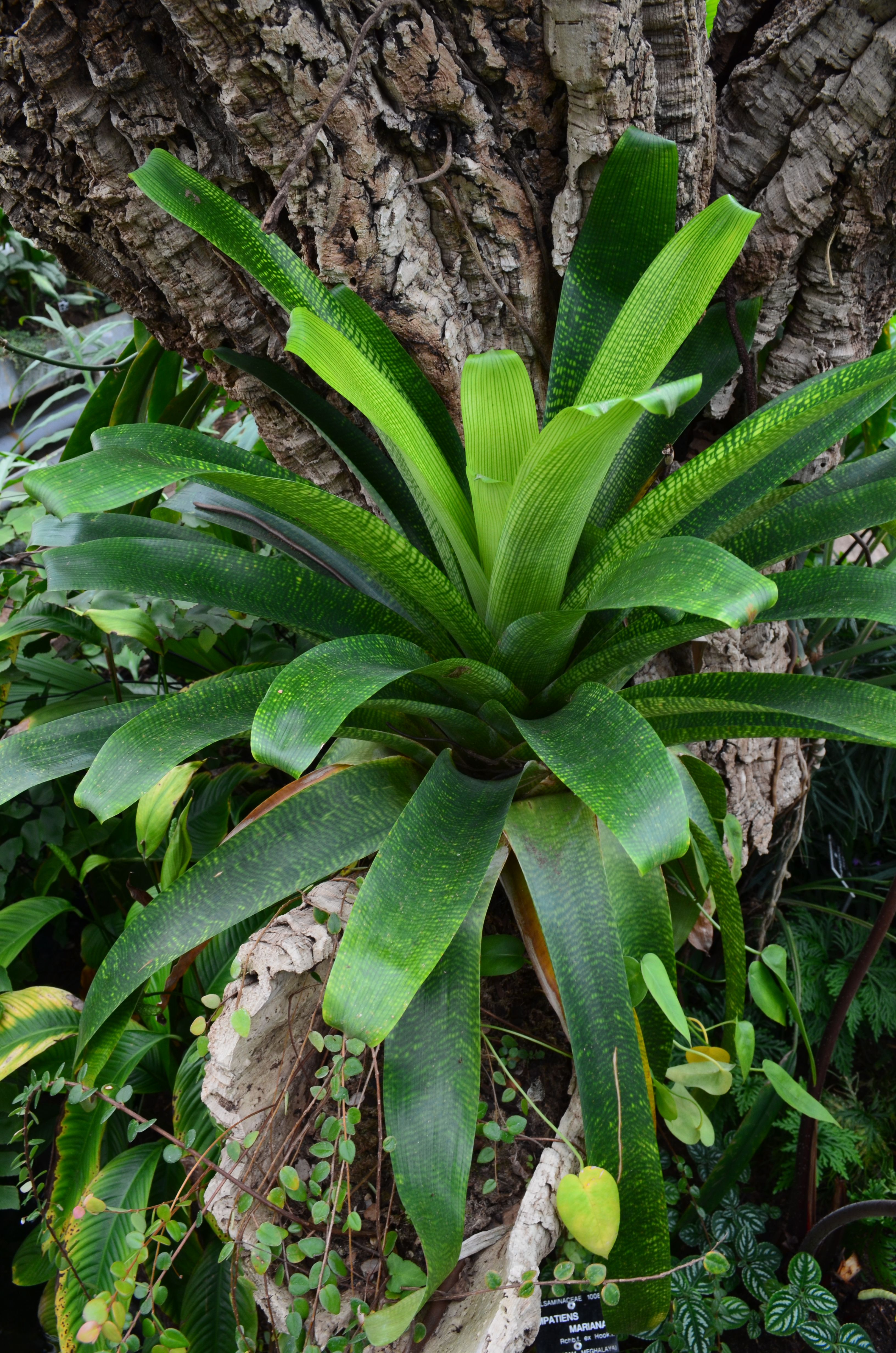 Vriesea fenestralis, espèce de Bromeliaceae